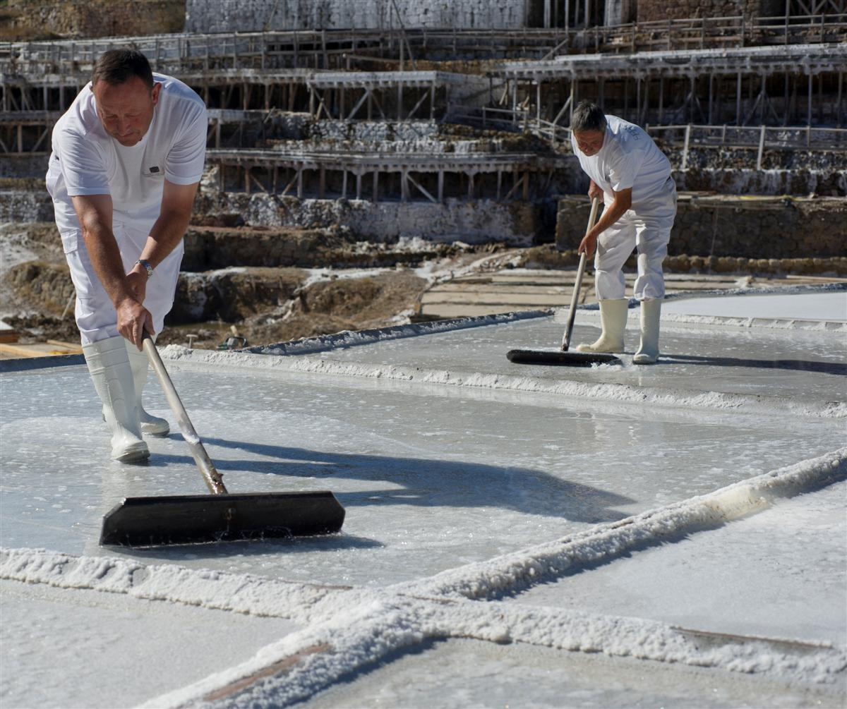 Salineros del Valle Salado de Salinas de Añana (País VAsco, España)produciendo sal